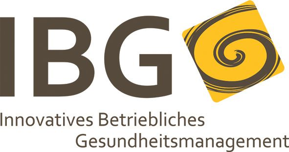 IBG-Logo neu 2019